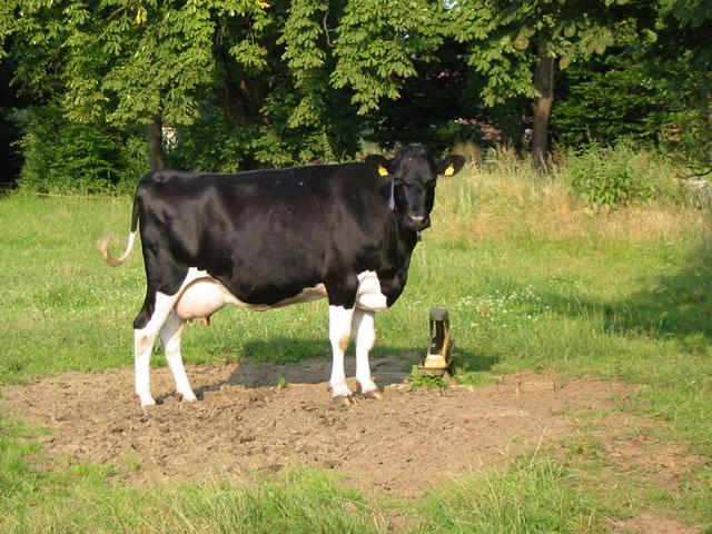 Holstein-Kuh auf einem Hof in Kölkebeck bei Halle Westfalen